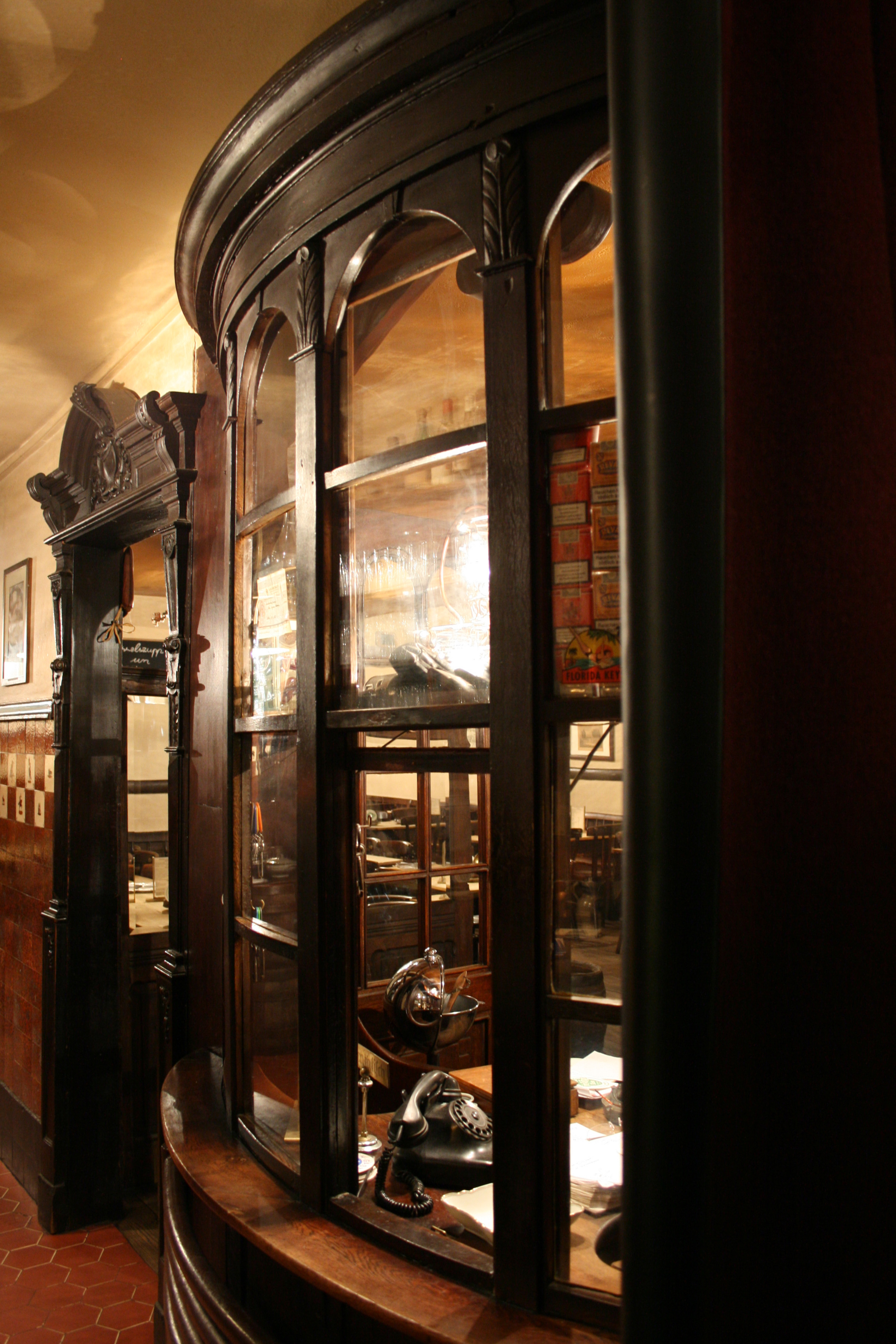 "Beichtstuhl" in cologne pub Haus Töller